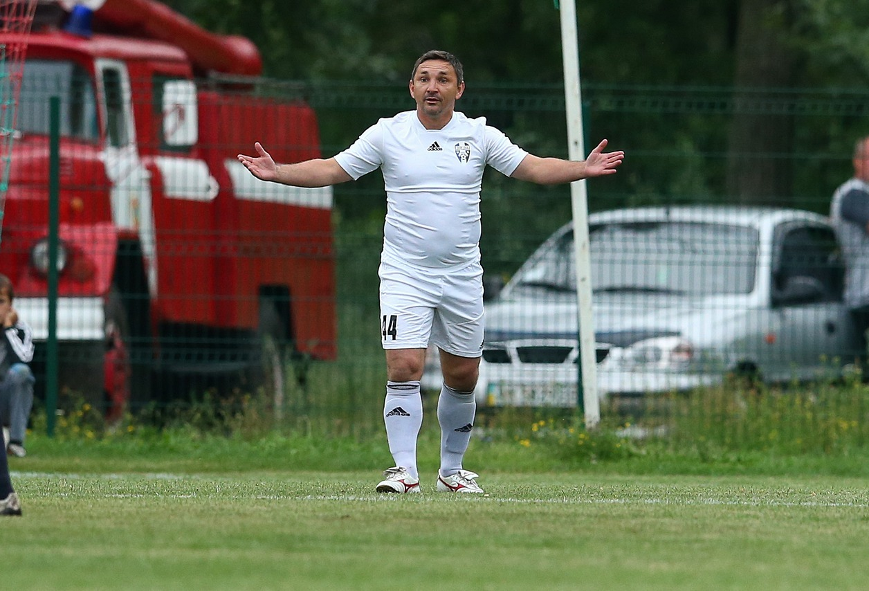 18.06.2015 Чемпионат Украины среди аматоров. Колос (Зачепиловка) - Балканы (Заря) - 0:0 «Колос» (Зачепиловка): Антоненко, Кучук (Нерубенко, 61), Васильев, Билык, Цапий, Михайлюк, Жданов (к), Тарасов, Батусов, Дяченко (Воробей, 79), Шарко. Запасные: Давыдов, Кателин, Котенко, Бодня. «Балканы» (Заря): Паламарчук, Д.Пархоменко, Саламаха, Ильницкий, Пенов (Полтавец, 90+4), Гаврилюк, К.Пархоменко, В.Златов (Е.Райчев, 70), Урсуленко, А.Райчев (к), В.Кириллов (Лазаренко, 81). Запасные: Потароченко, А.Кириллов, Голубев, Куртов. Предупреждения: Тарасов, 44; Шарко, 79 – В.Златов, 23; В.Кириллов, 63; Гаврилюк, 67; Пенов, 87. Судьи: А.Омельченко (Славянск), Д.Сердюк (Полтава), В.Попков (Волноваха). Четвертый арбитр – А.Афанасьев (Норцовка, Харьковская область). Наблюдатель арбитража – В.Головко (Днепропетровск).